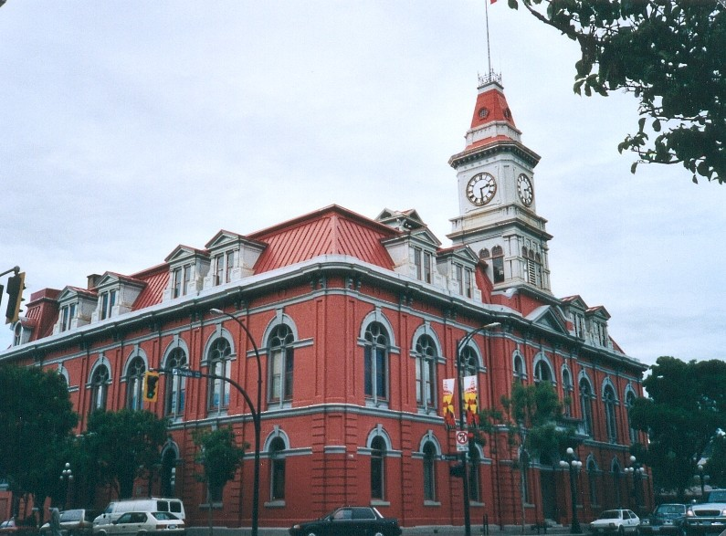 Copyright : Georgio Date : mai 2001 Sujet : Hotel de ville de Victoria, ile de Vancouver, Colombie-Britannique, Canada